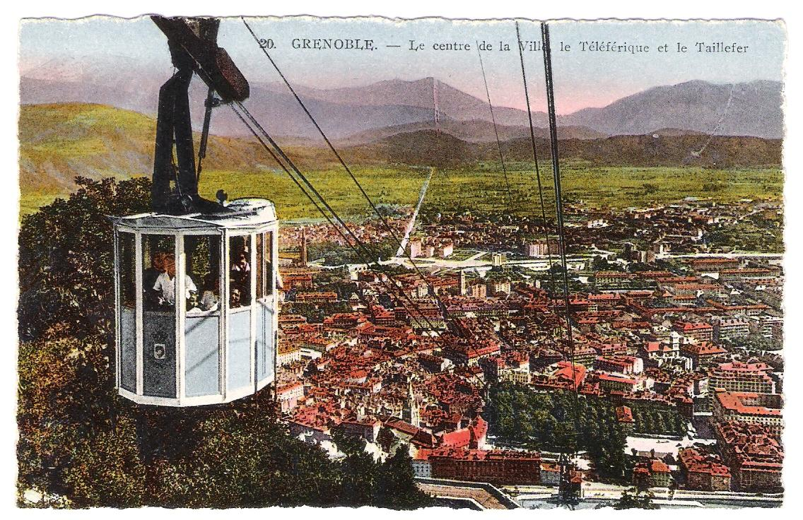 Téléphérique de Grenoble , France